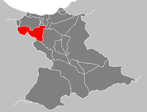 Municipality in Venezuela: Juanmanuelcajigal-anzoategui.PNG